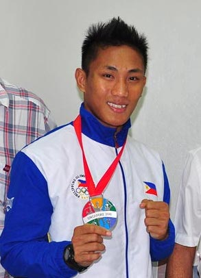 SEAGAMES MEDALISTS. Rogen Ladon